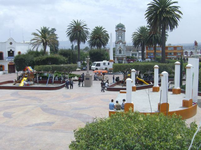 Imagen del Jardín Municipal "Felipe Ángeles" en la cabecera municipal de Cuautepec de Hinojosa, Hidalgo, México